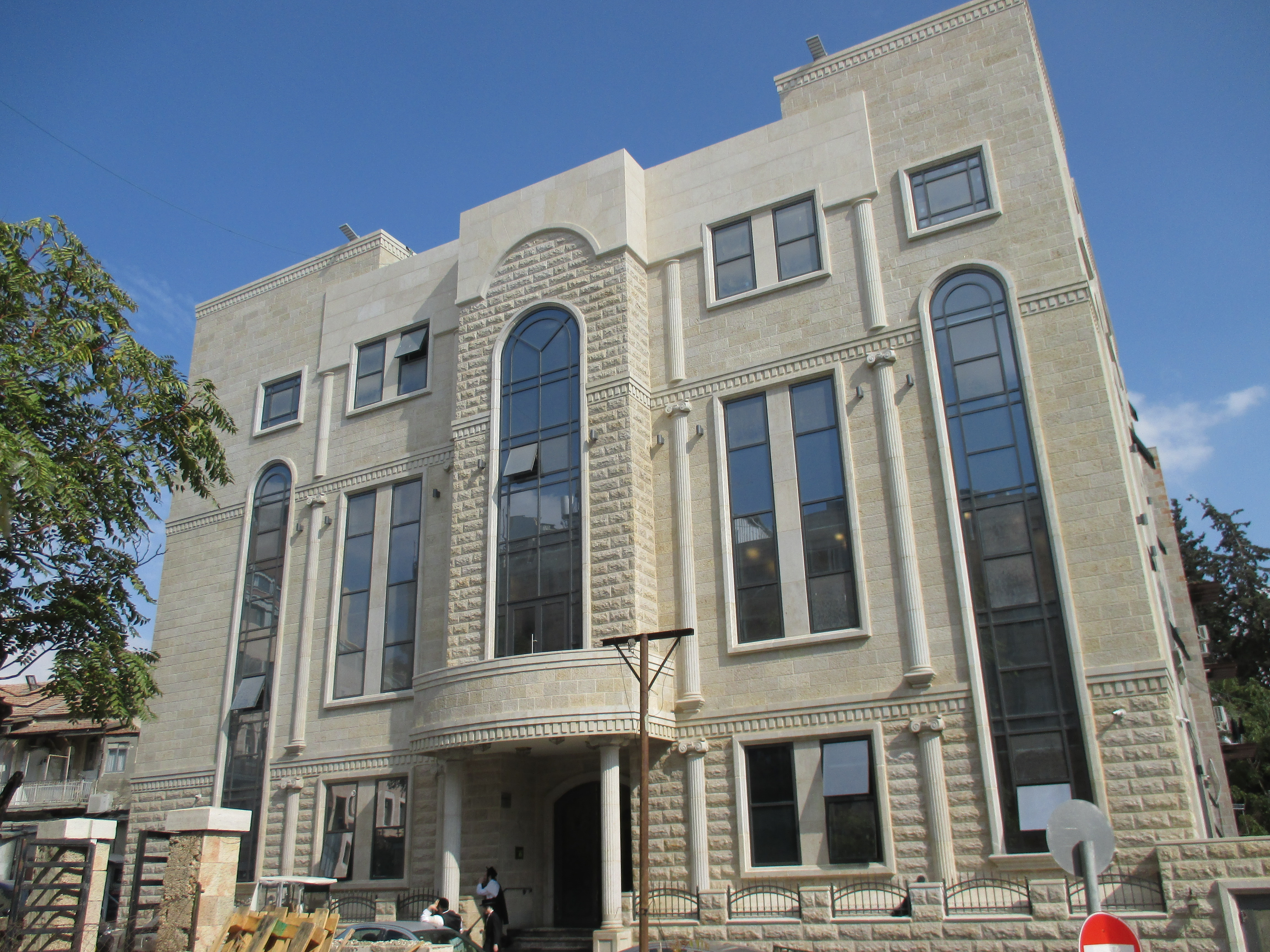 בית הכנסת סאטמר ברחוב יואל בירושלים.